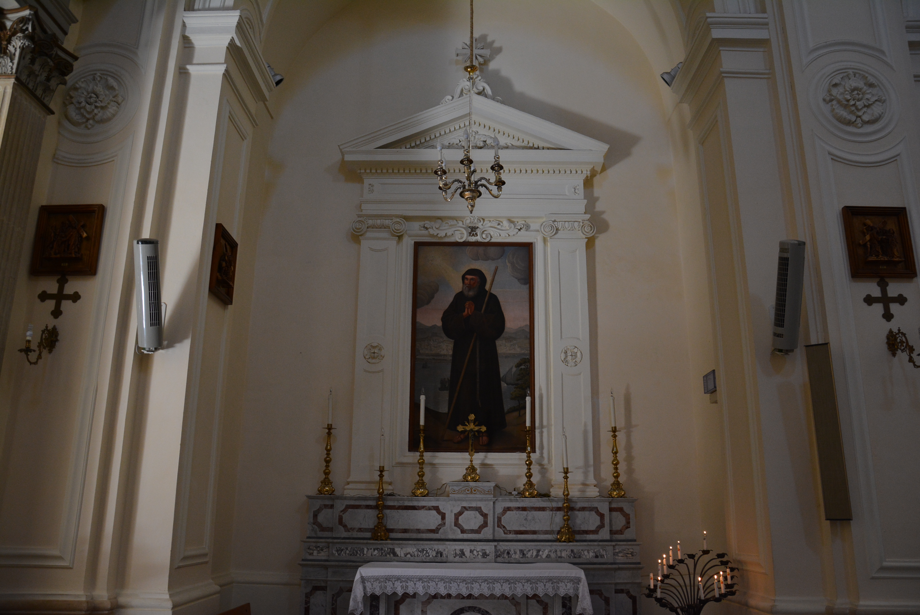 Basilica di Santa Maria de Finibus Terrae